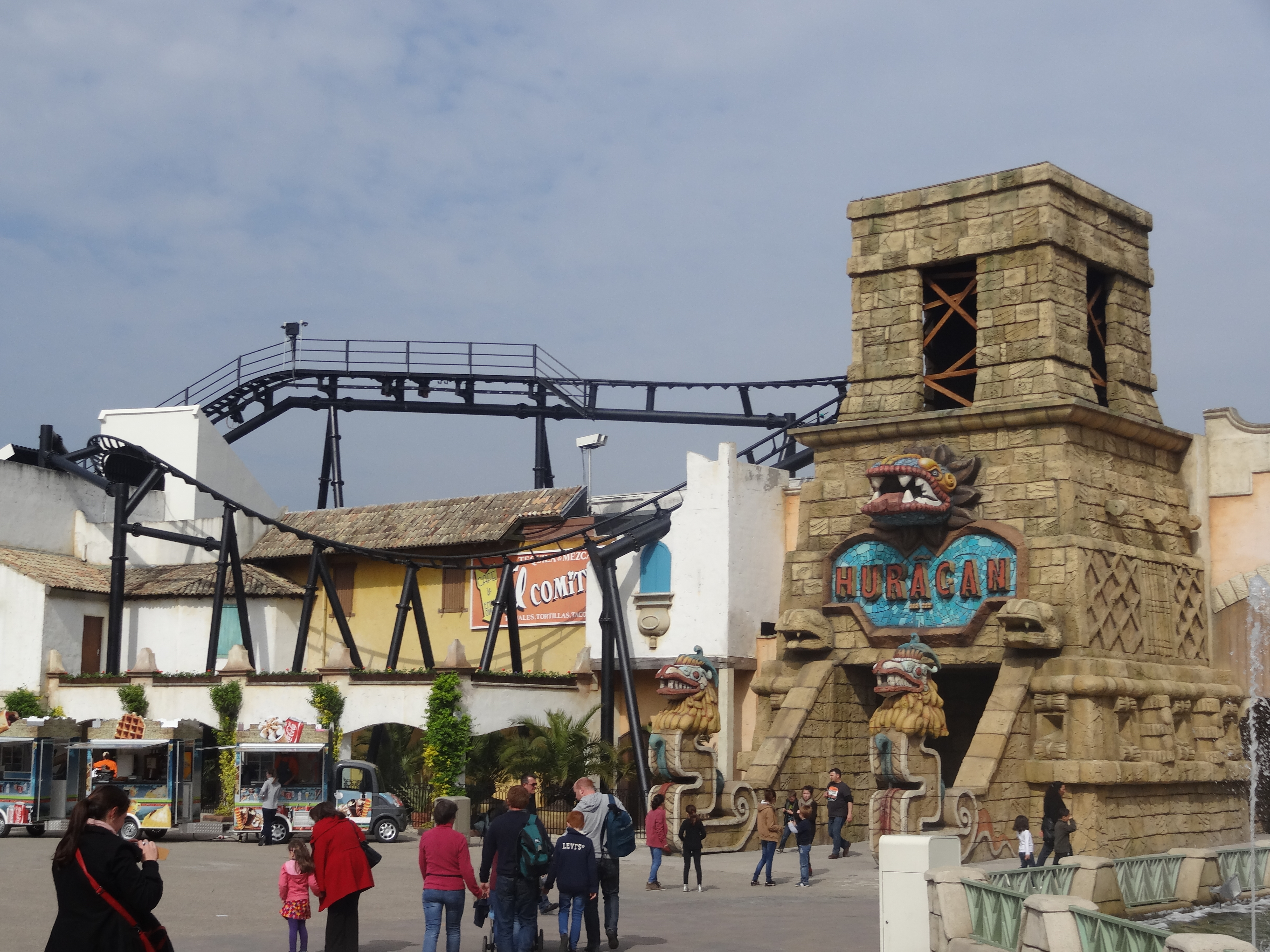 Montagnes russes Huracan à Bellewaerde.